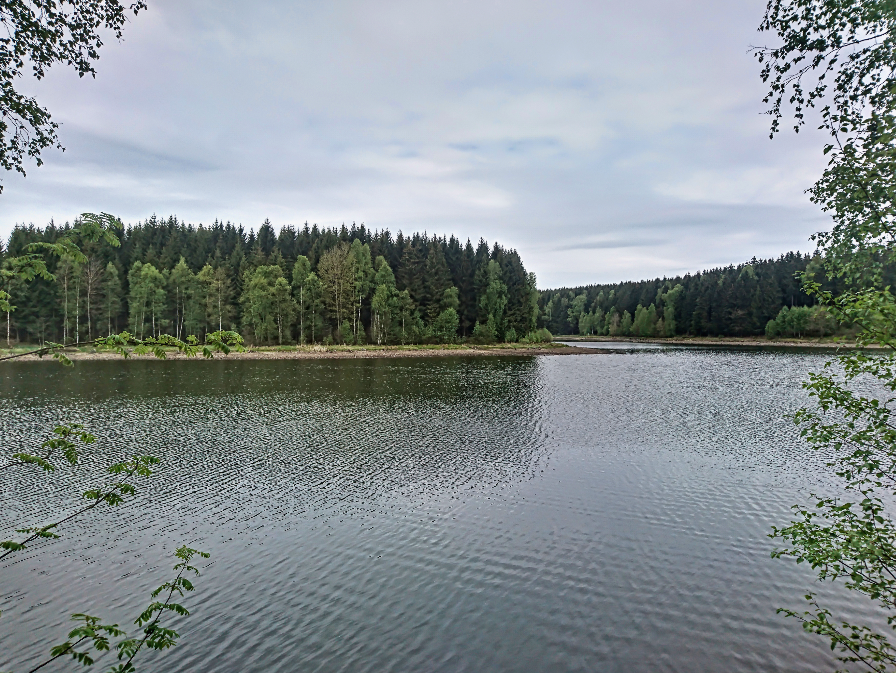 Frankenteich (Blick über den Teich)